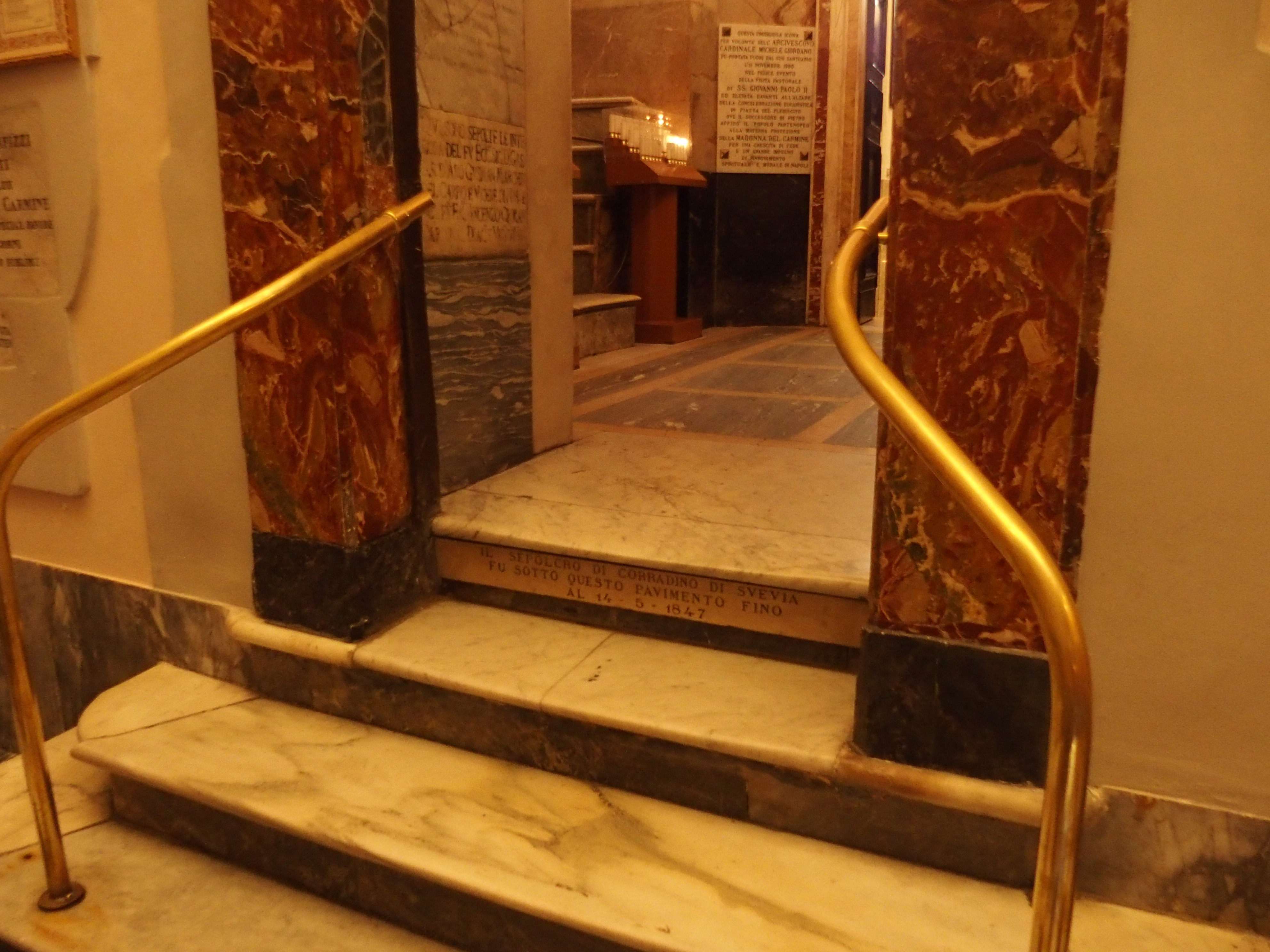 Lloc de l'antic enterrament de Conradí de Suàbia, a la pujada del cambril de Santa Maria del Carmine (Nàpols).